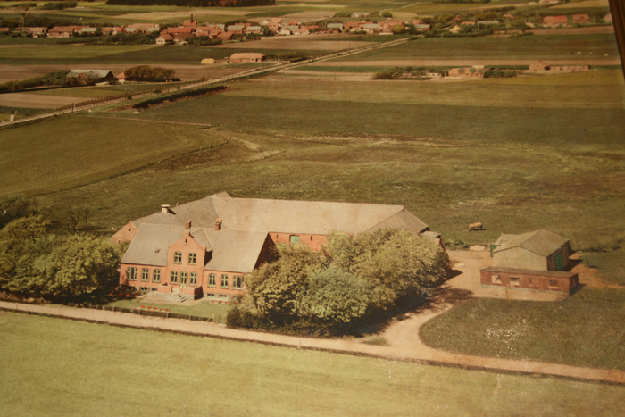 Kirkebygaard